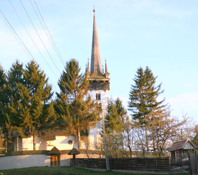 Biserica reformată din Mănăstireni